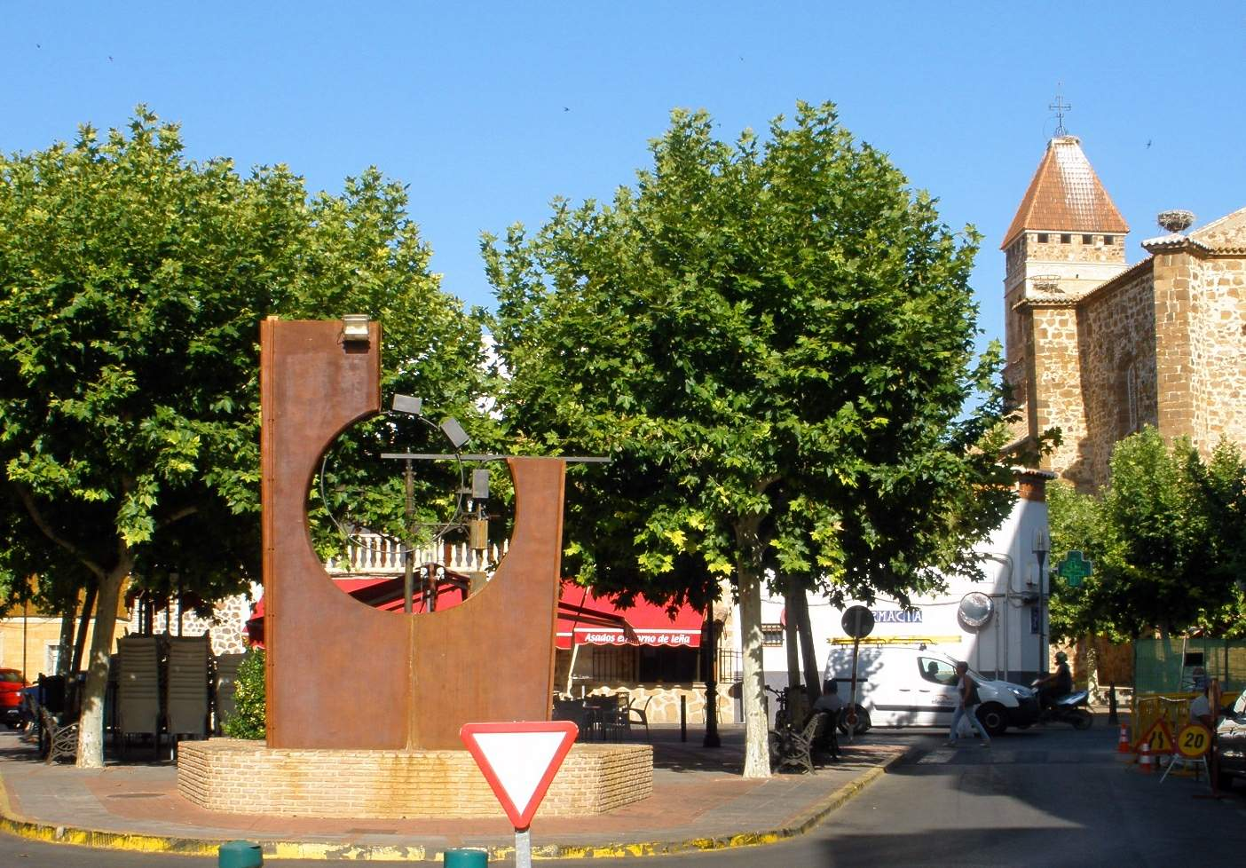 Argamasilla de Calatrava (Ciudad Real)